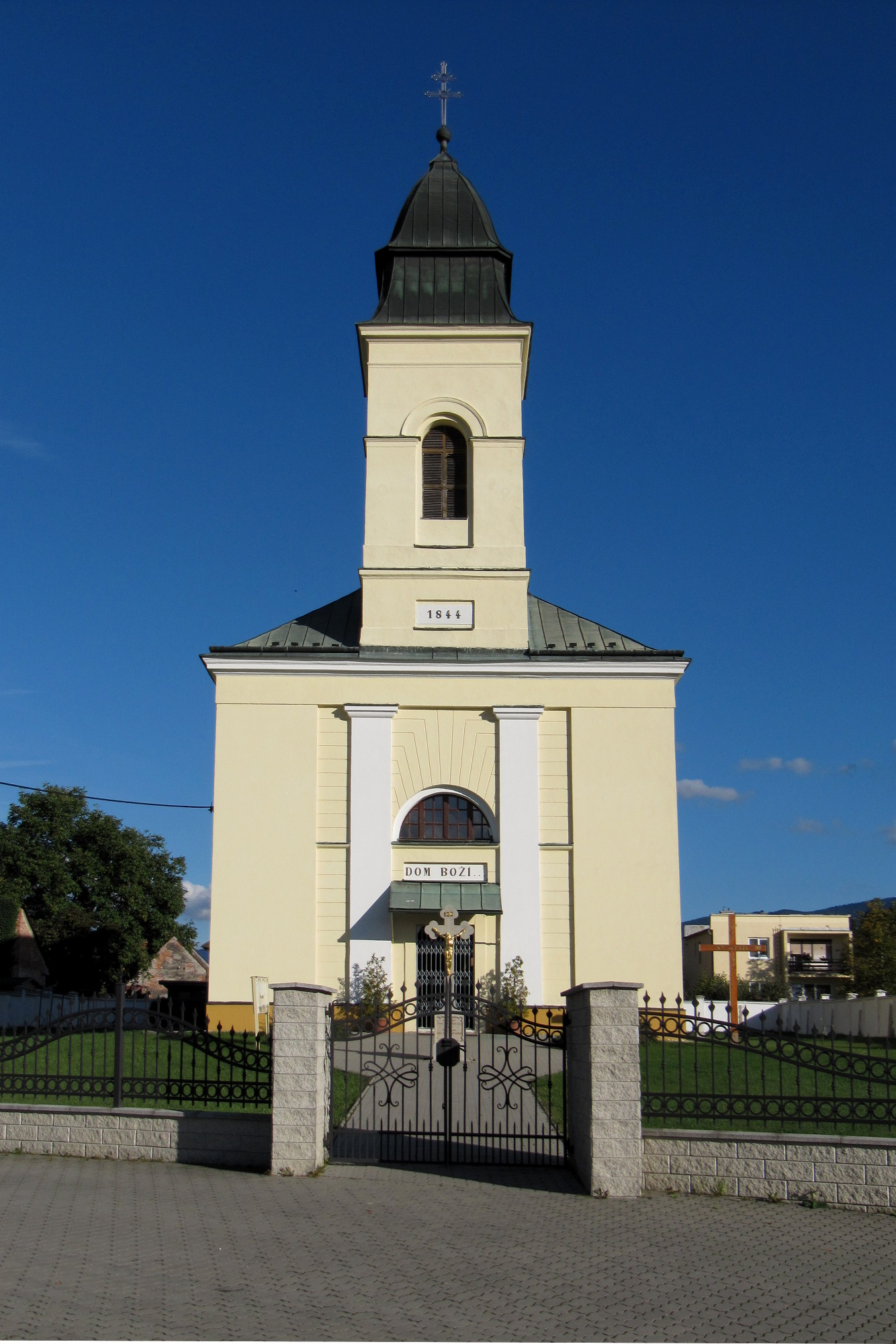 Kostol v Bytčici (mestská časť Žiliny).